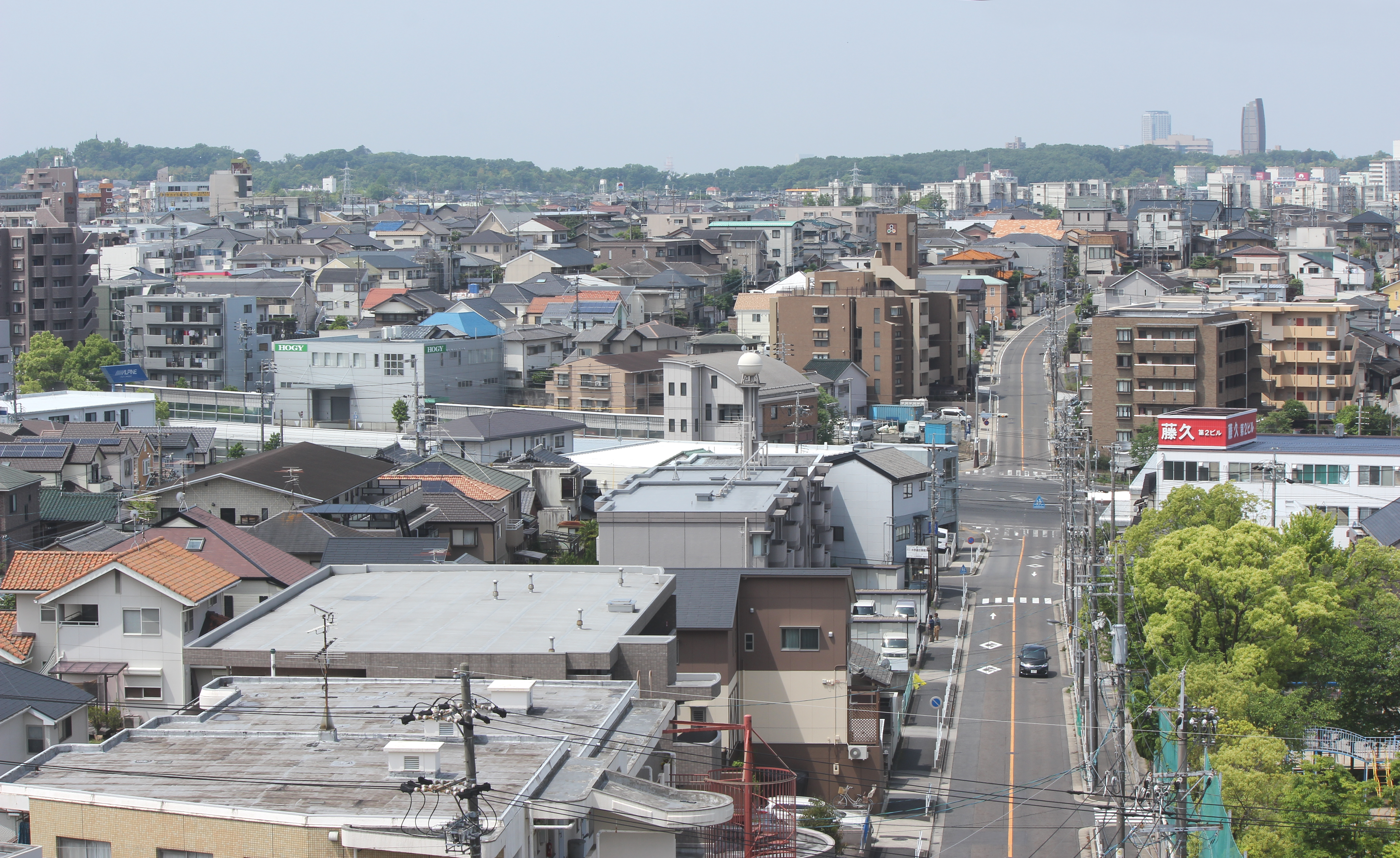 名古屋市名東区の名古屋環状2号線沿道。